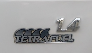 Logo del sistema Tetrafuel de Fiat